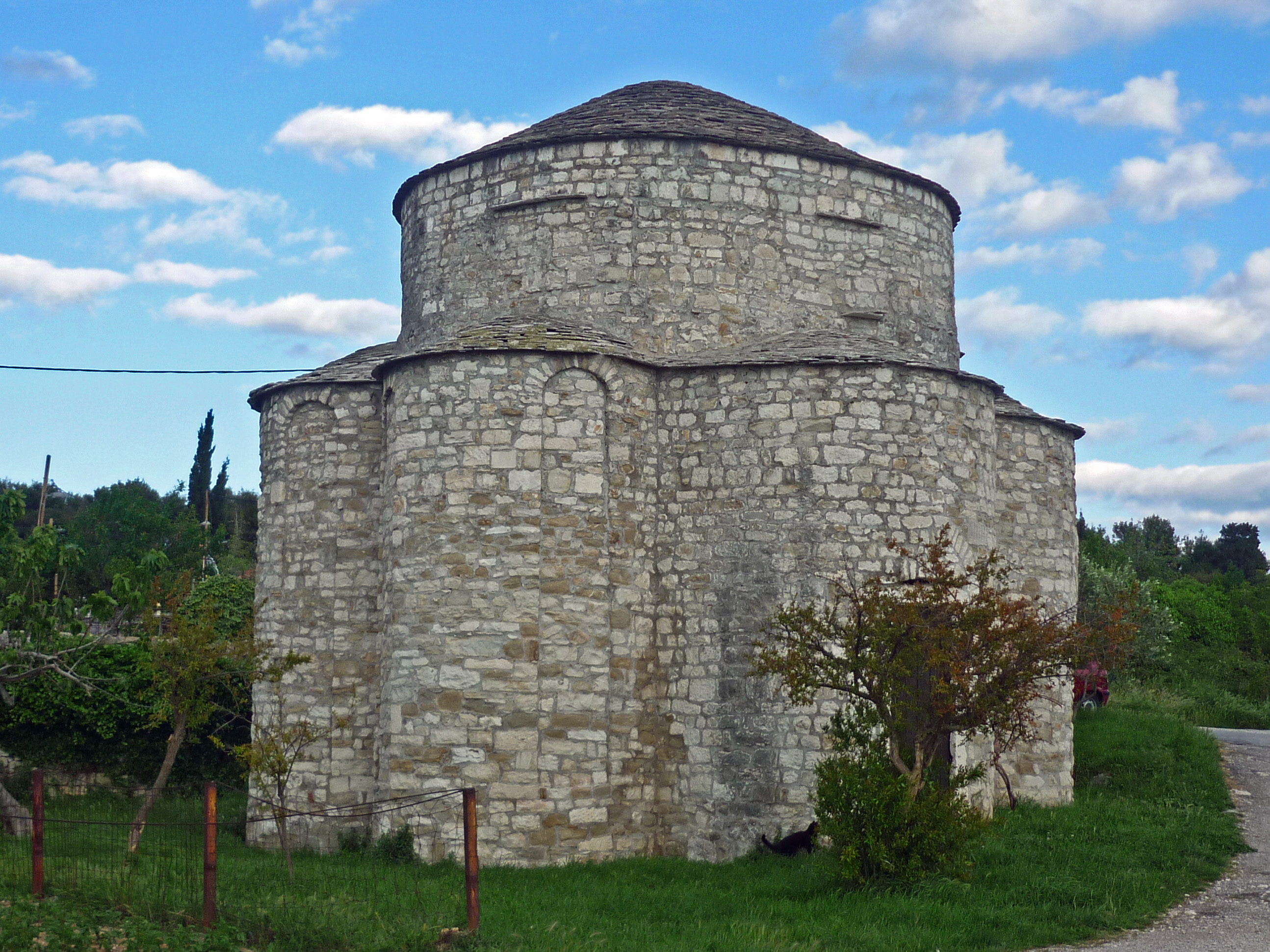 Kirche der Hl. Dreifaltigkeit (Sv. Trojice) in Split-Poljud, eine vorromanische Rundkirche (9. Jhdt.) mit sechs Apsiden